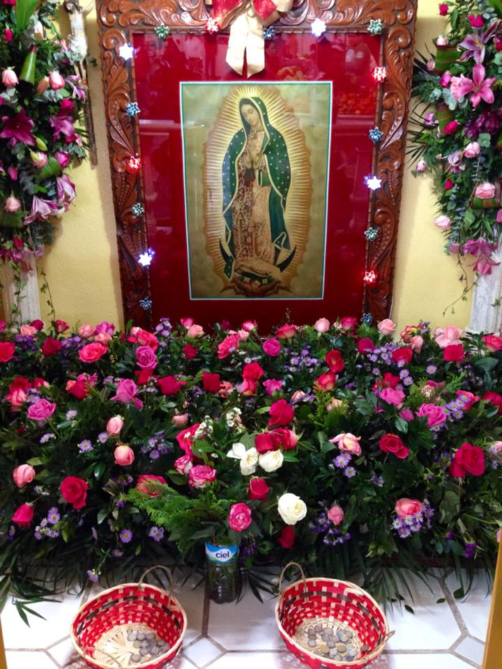 El comercio de diversos productos comestibles y de primera necesidad se realiza en los alrededores del Mercado Municipal de Uriangato "José Dionisio Vallejo"